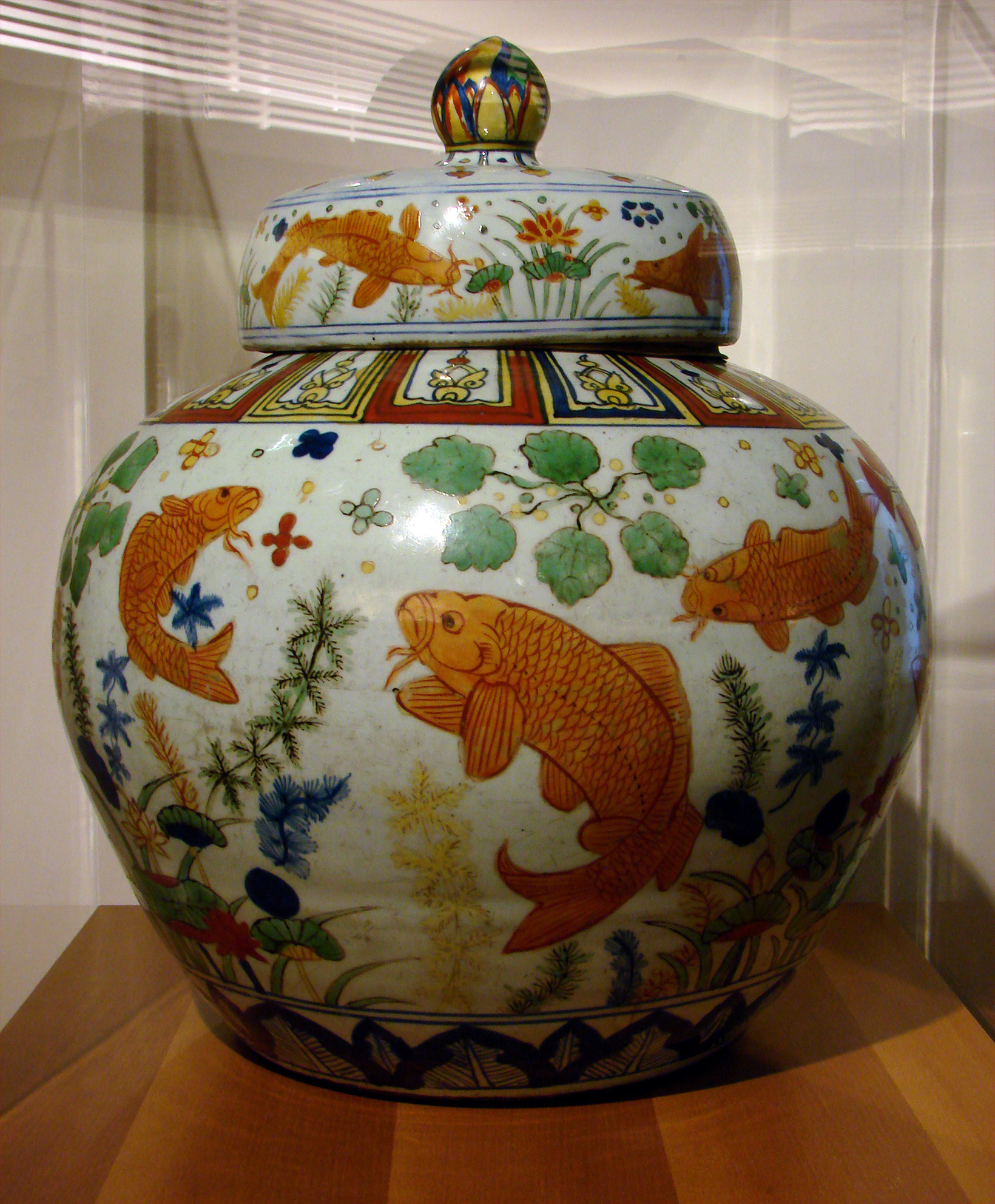 Jarre à couvercle (d'une paire) à décor de poissons. Dynastie Ming, période jiajing (1522-1566). Musée Guimet, Paris.